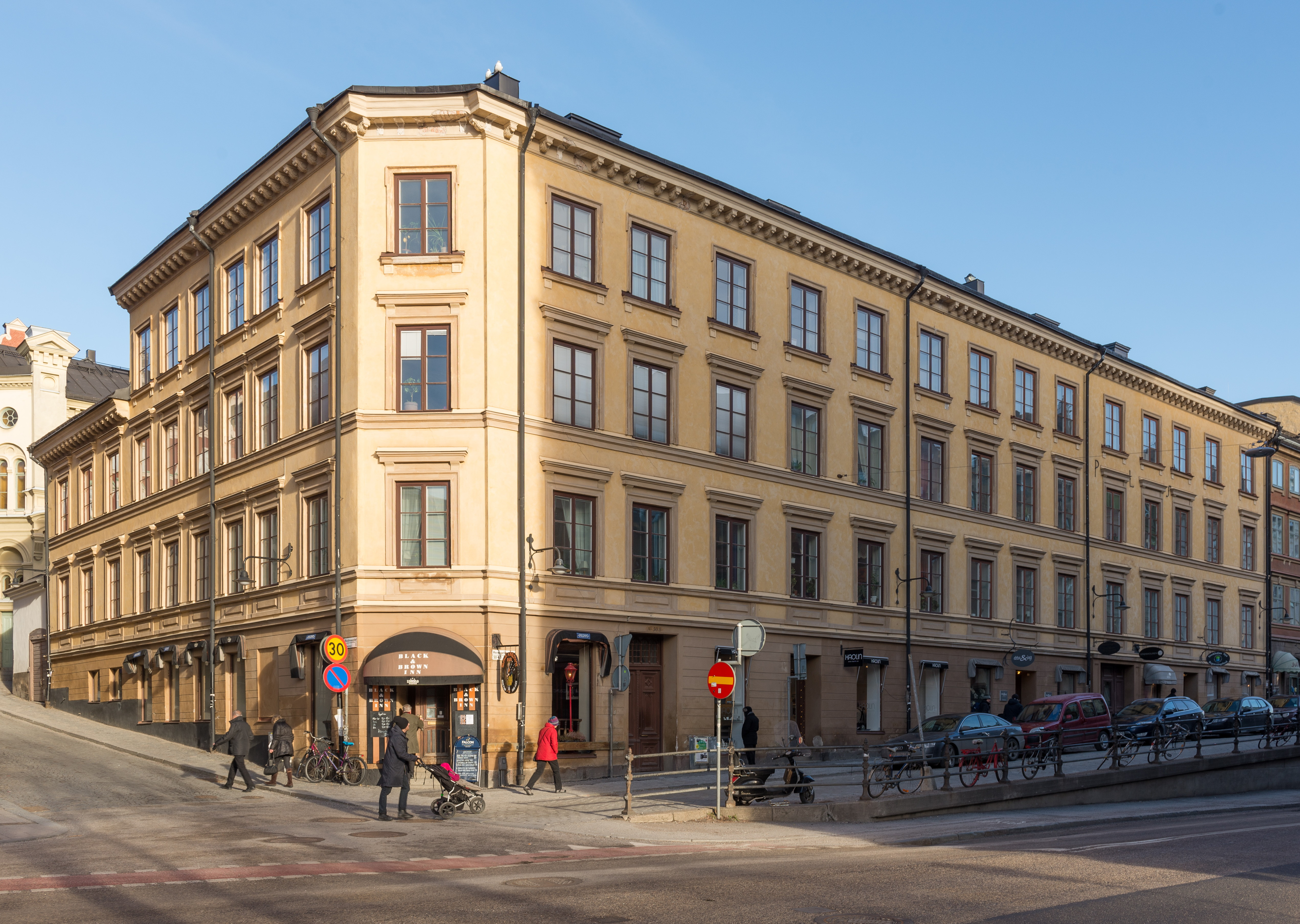 Hornsgatan 50, kvarteret Svalgången